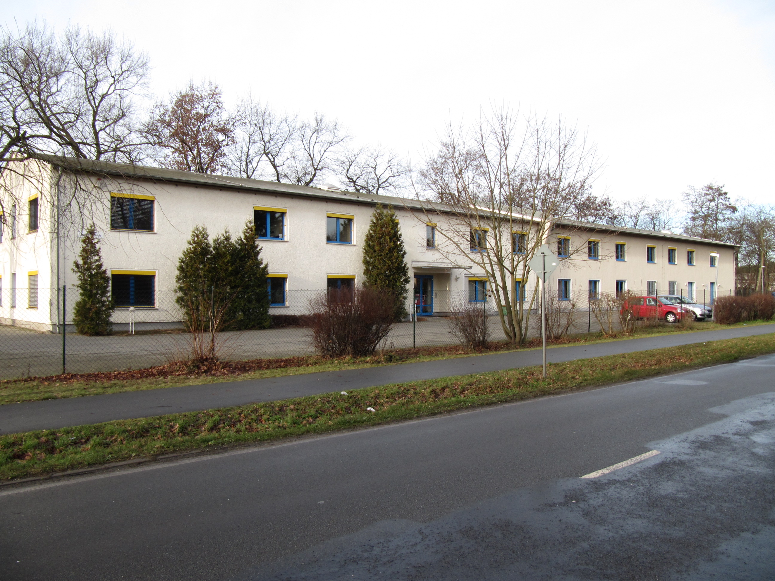 amts- und gemeindeverwaltung beetzsee